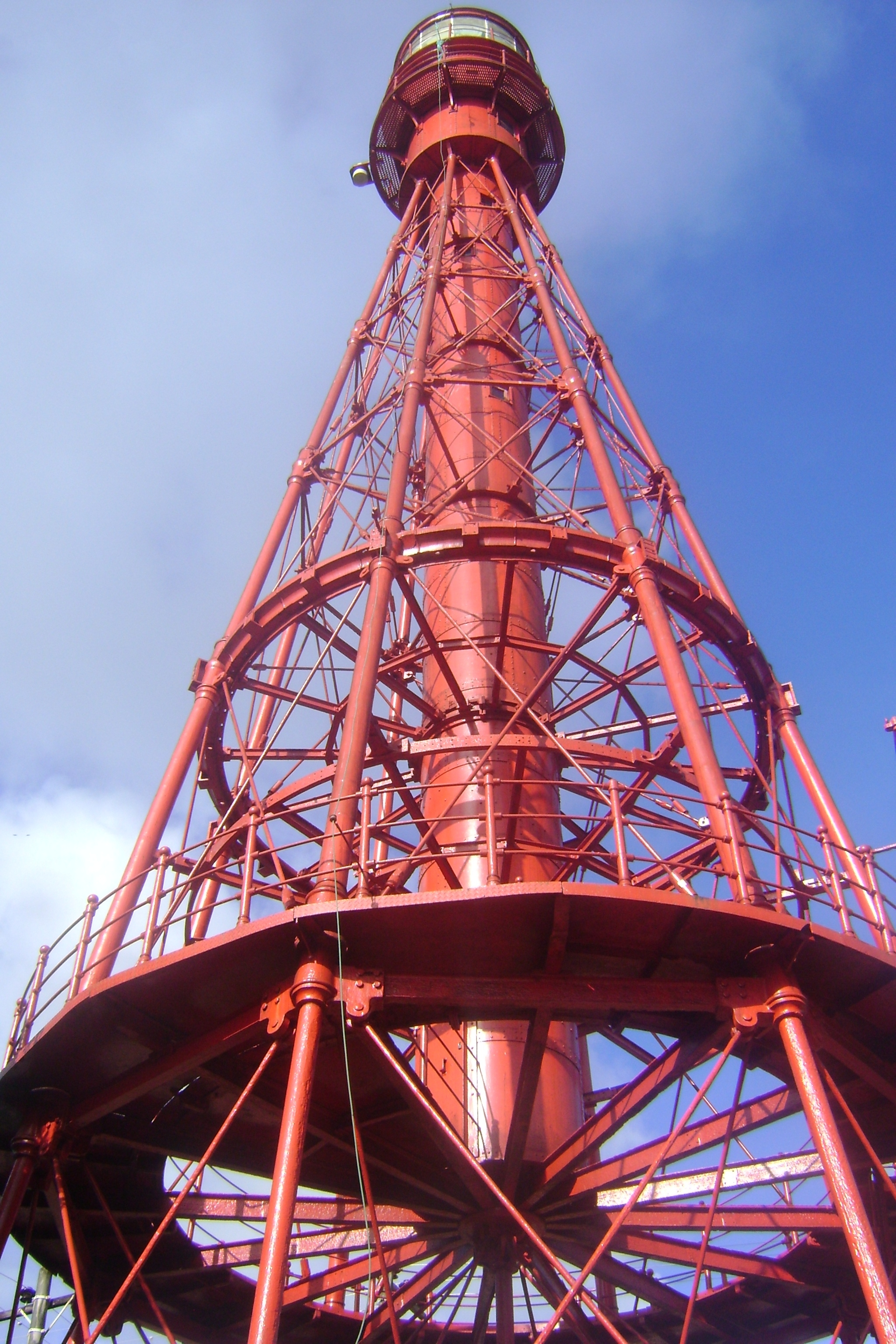 Farol de Salinas - Em funcionamento desde de 1937 Salinópolis - Pará Amazônia Atlântica - Brasil Lighthouse Salinas - In operation since 1937 Salinas City of Pará State Amazon Atlantic - Brazil